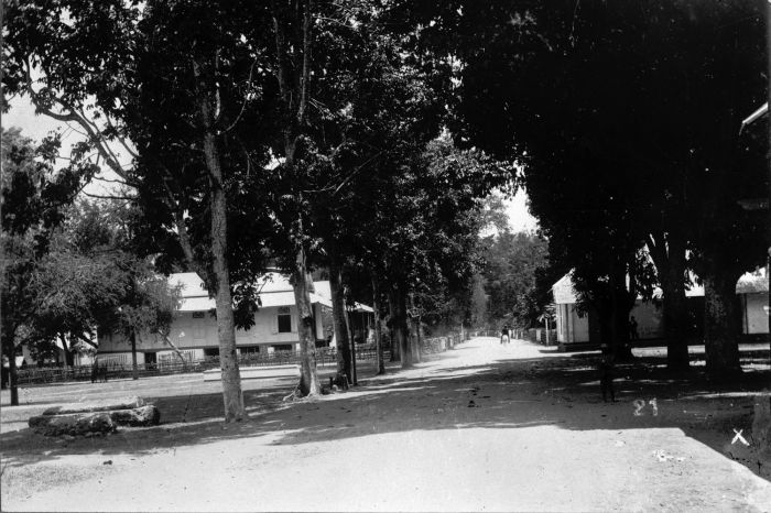 Foto. Manado, straatbeeld.